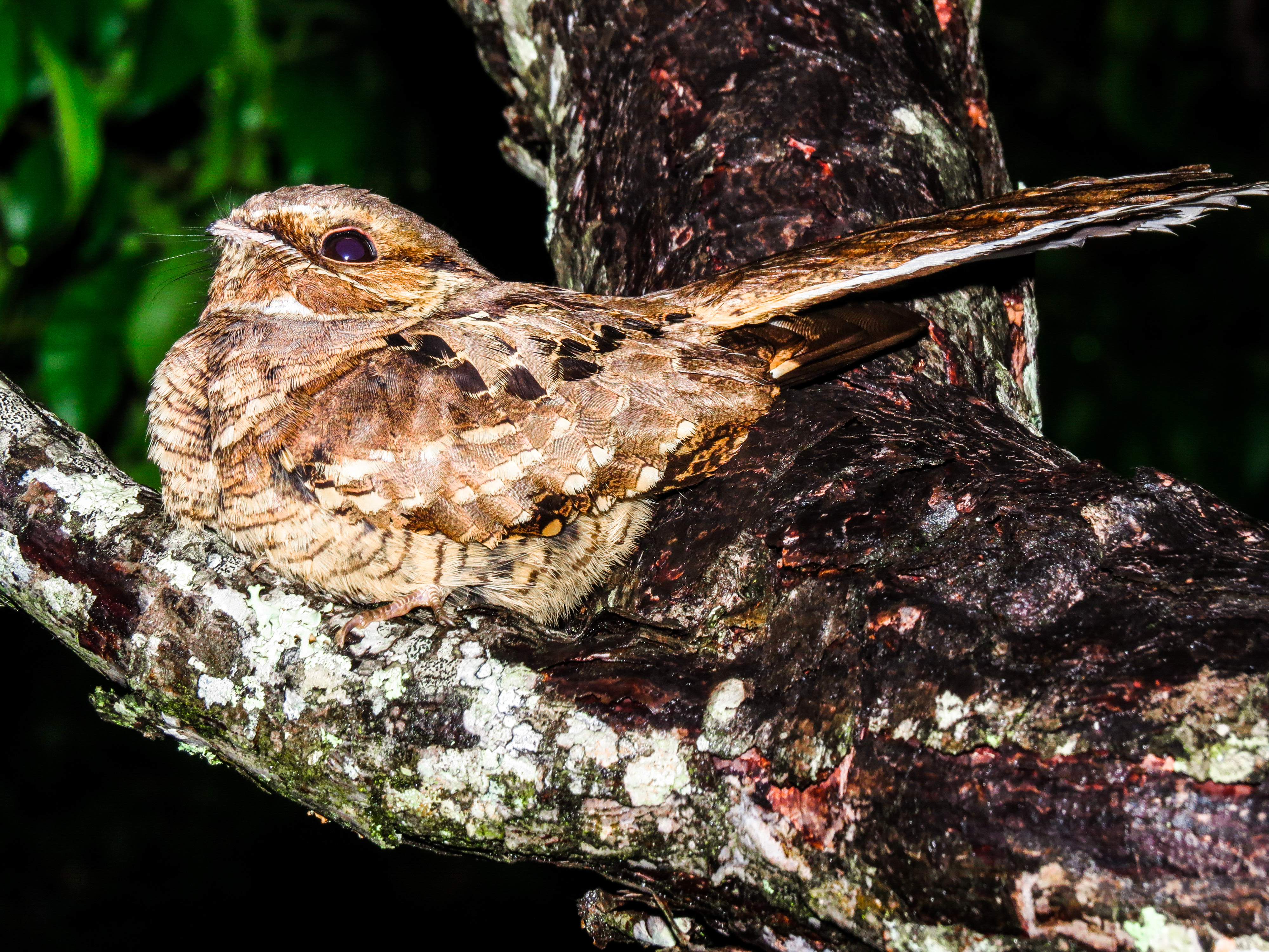 Bacurau. Hydropsalis albicollis. Bioma: Cerrado